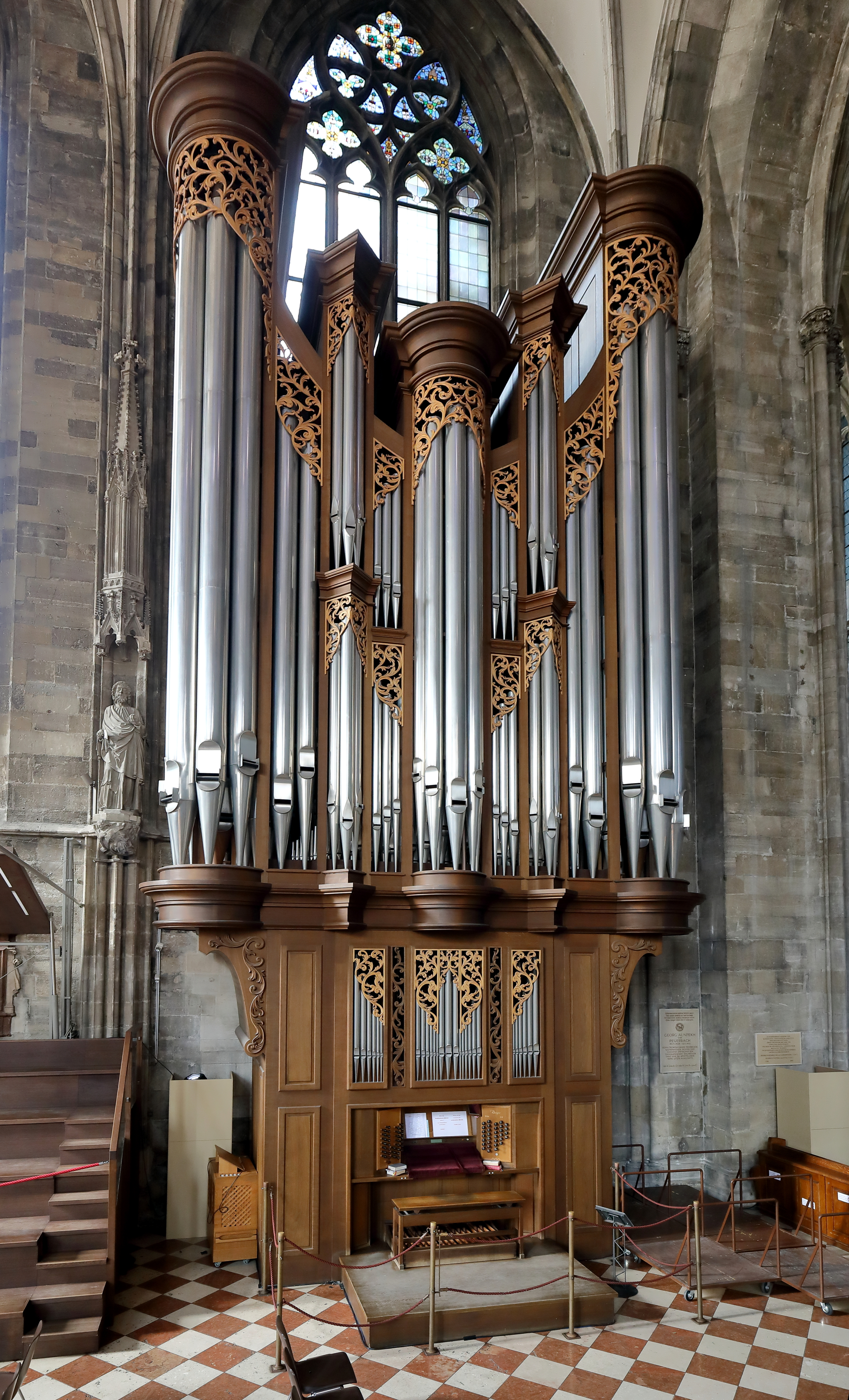 Die „neue Domorgel“ bzw. „Rieger-Orgel“ im rechten Seitenschiff (Apostelschiff) des Stephansdoms in der österreichischen Bundeshauptstadt Wien.Das von der Orgelbaufirma Rieger gefertigte Instrument hat 55 Register auf 4 Manualen und wurde am 13. September 1991 geweiht. Sie ersetzte die eigentliche Domorgel (Kauffmann-Orgel) auf der Westempore, die im Prinzip nicht mehr spielbar war und nach der Inbetriebnahme der Rieger-Orgel außer Betrieb genommen wurde (2017 wurde die Kauffmann-Orgel, österreichs größte Orgel, zwecks Instandsetzung demontiert und abtransportiert).